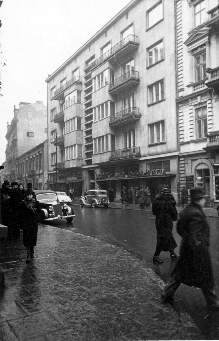 Luksusowa, modernistyczna i zabytkowa kamienica z 1937 o adresie ul. Szpitalna 4 w Warszawie (Polska). Architekt Zdzisław Mączeński.